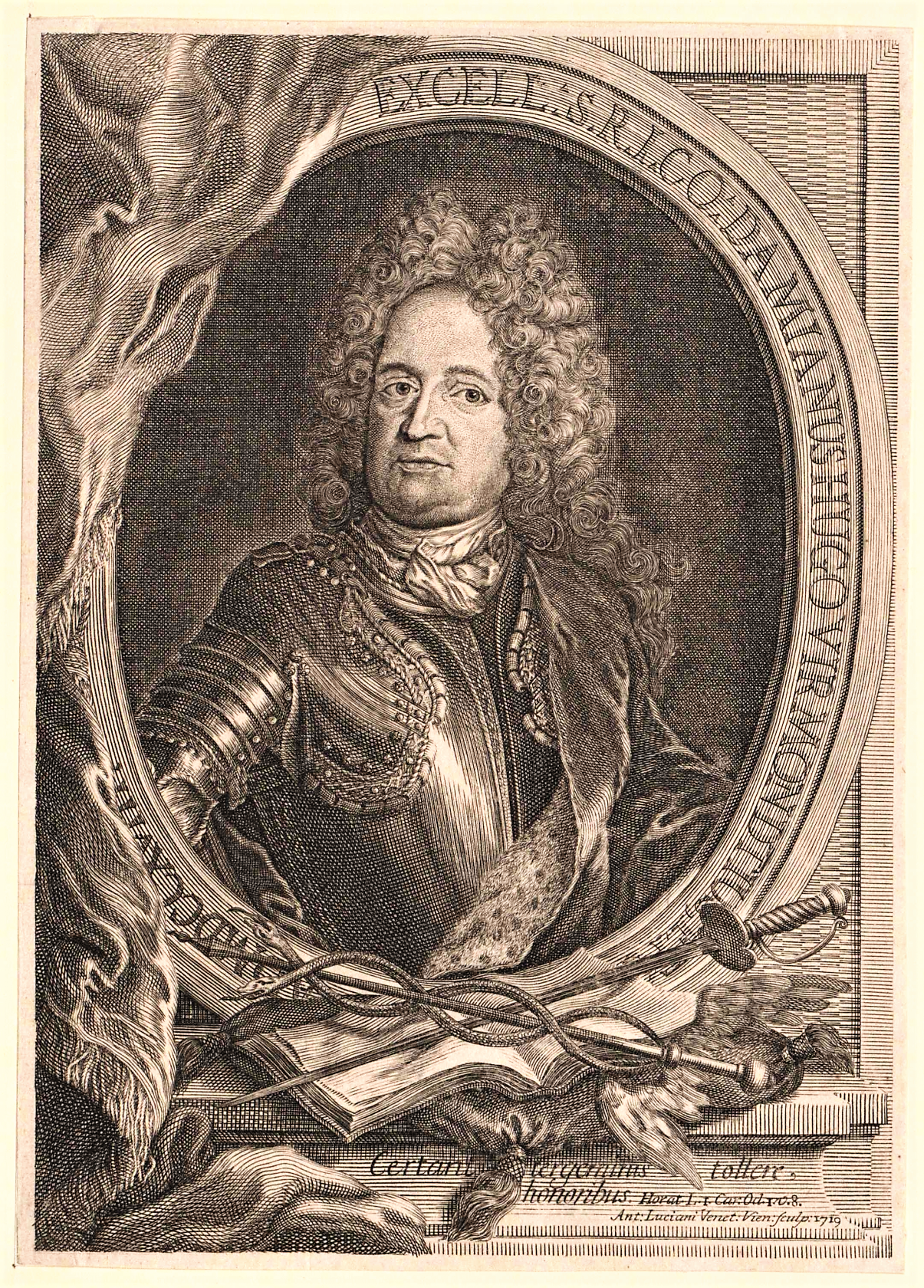 Damian Hugo von Virmond (1666-1722), Feldzeugmeister und Diplomat